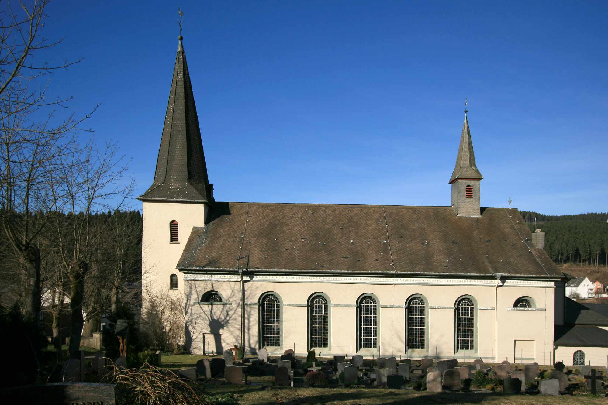 Kirche Oedingen, Ansicht von Süden